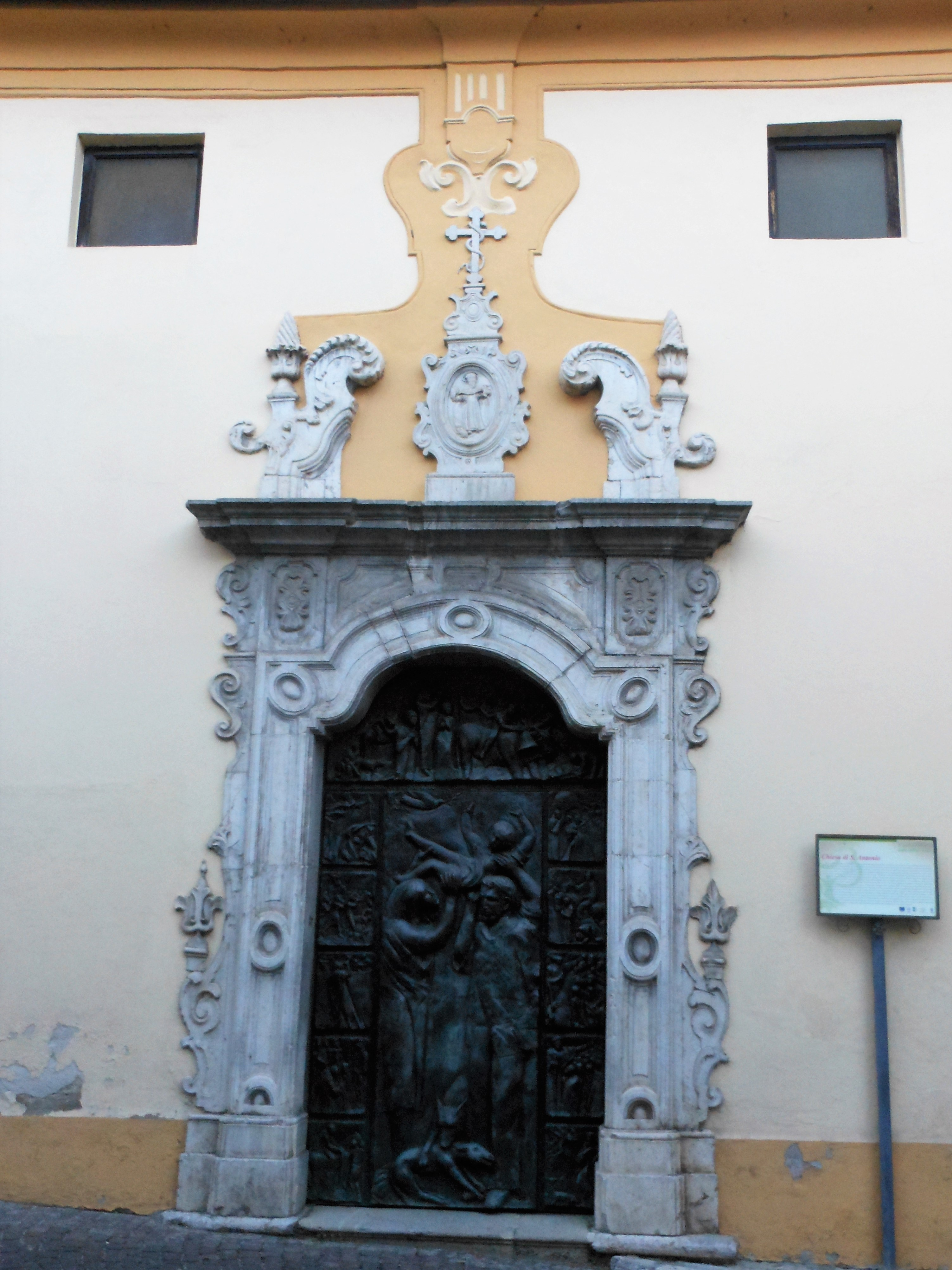 Portale Chiesa di S.Antonio, Pignola